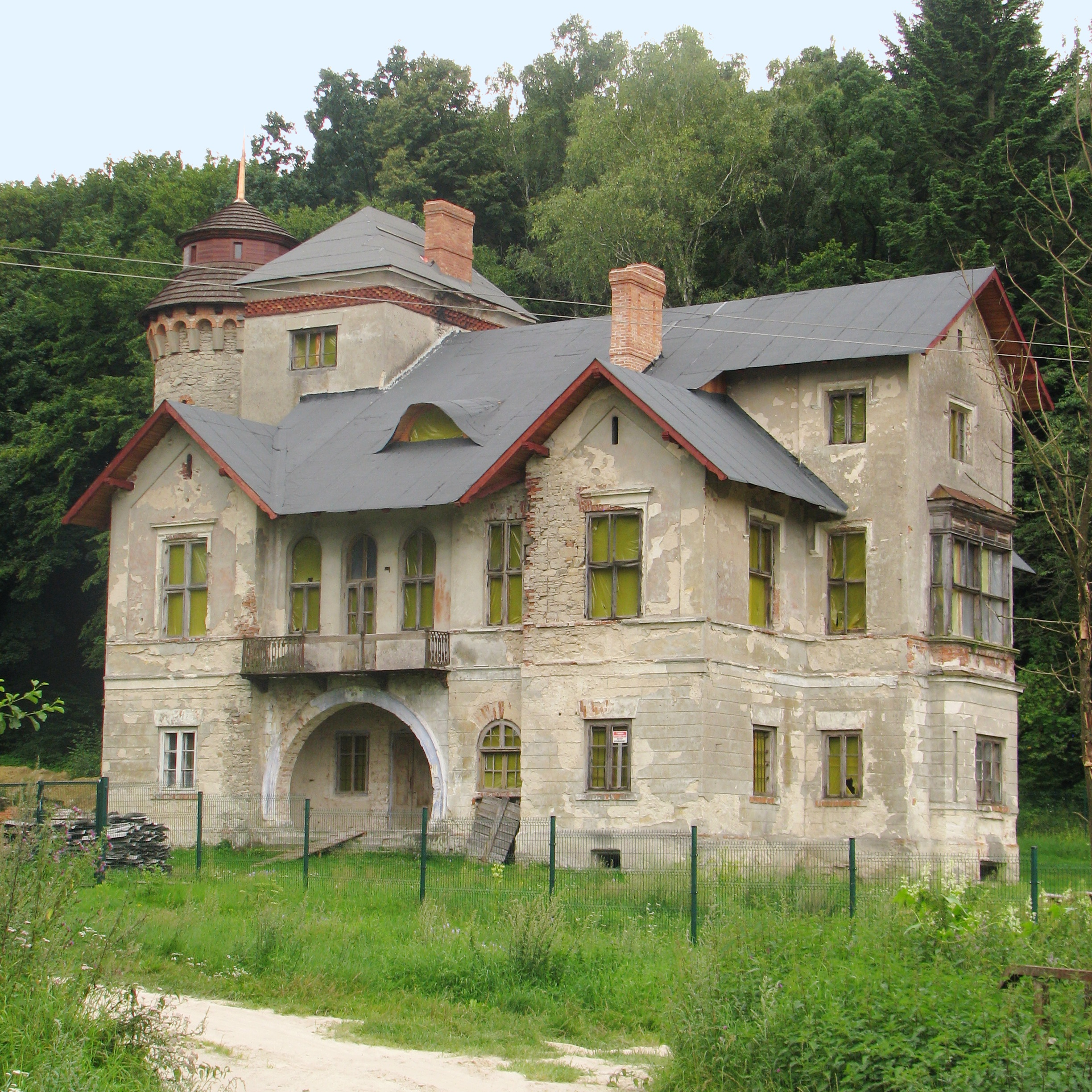 Pałac w zespole pałacowym „Dzięki” w Wiązownicy-Kolonii, gmina Staszów, województwo świętokrzyskie, Polska. Zabytek prawnie chroniony. W trakcie renowacji w 2011 r. Widok od frontu.